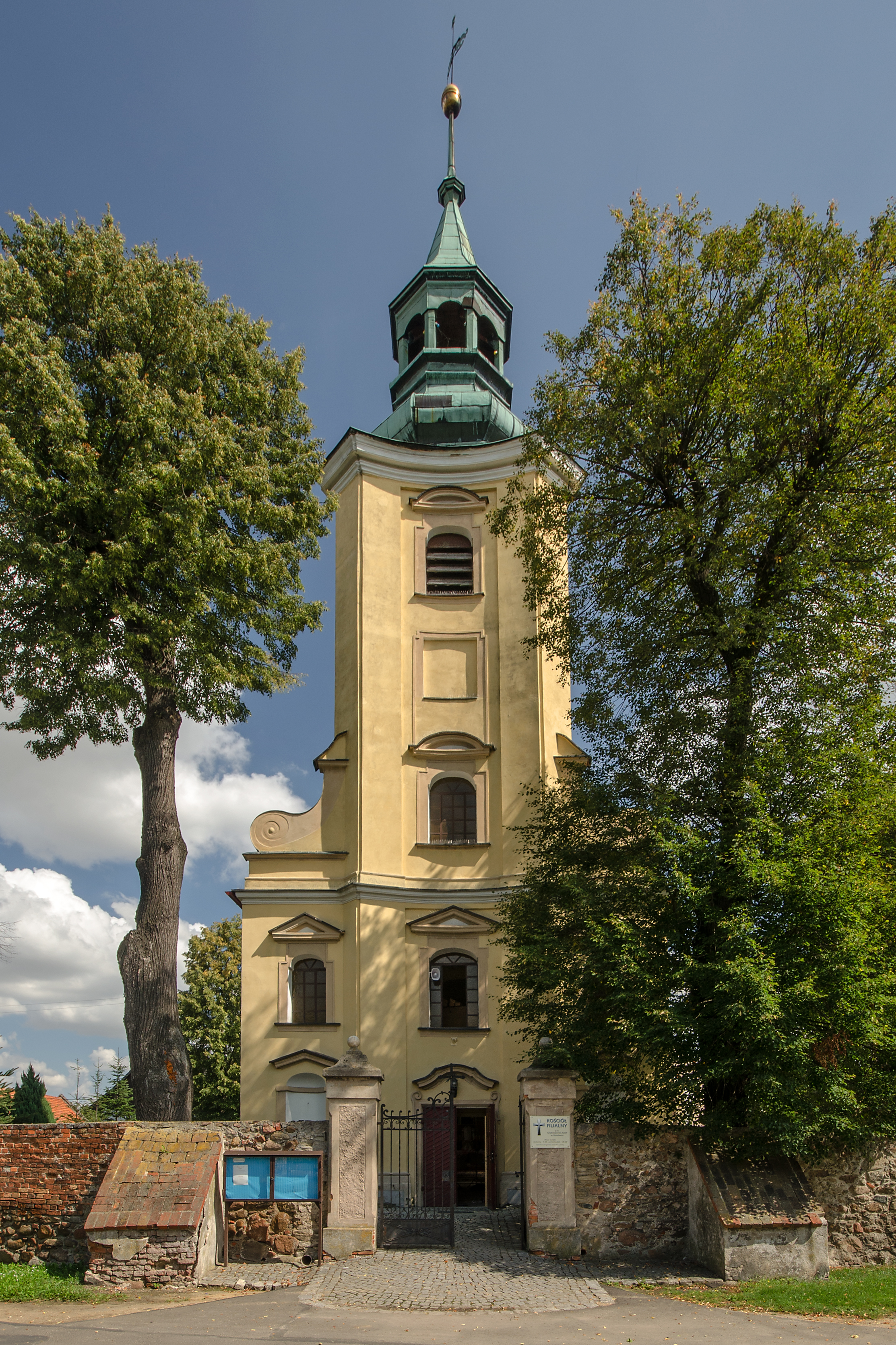 Wojsław - rzymskokatolicki kościół parafialny p.w. Wszystkich Świętych, XVI, XVIII